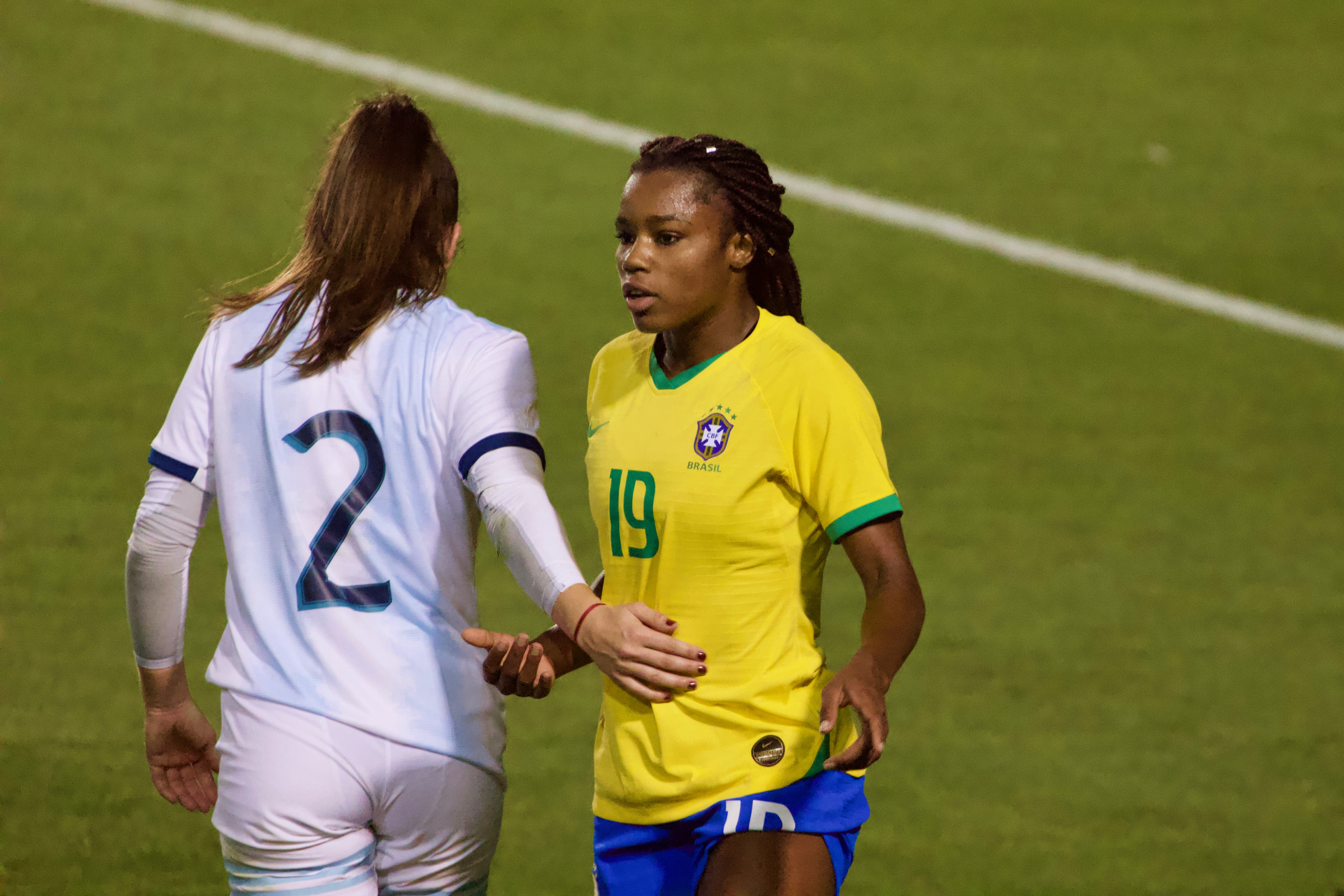 Ludmila lors d un tournoi international - Sao Paulo 2019